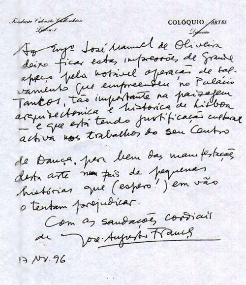 Carta enviada ao Engº José Manuel de Oliveira